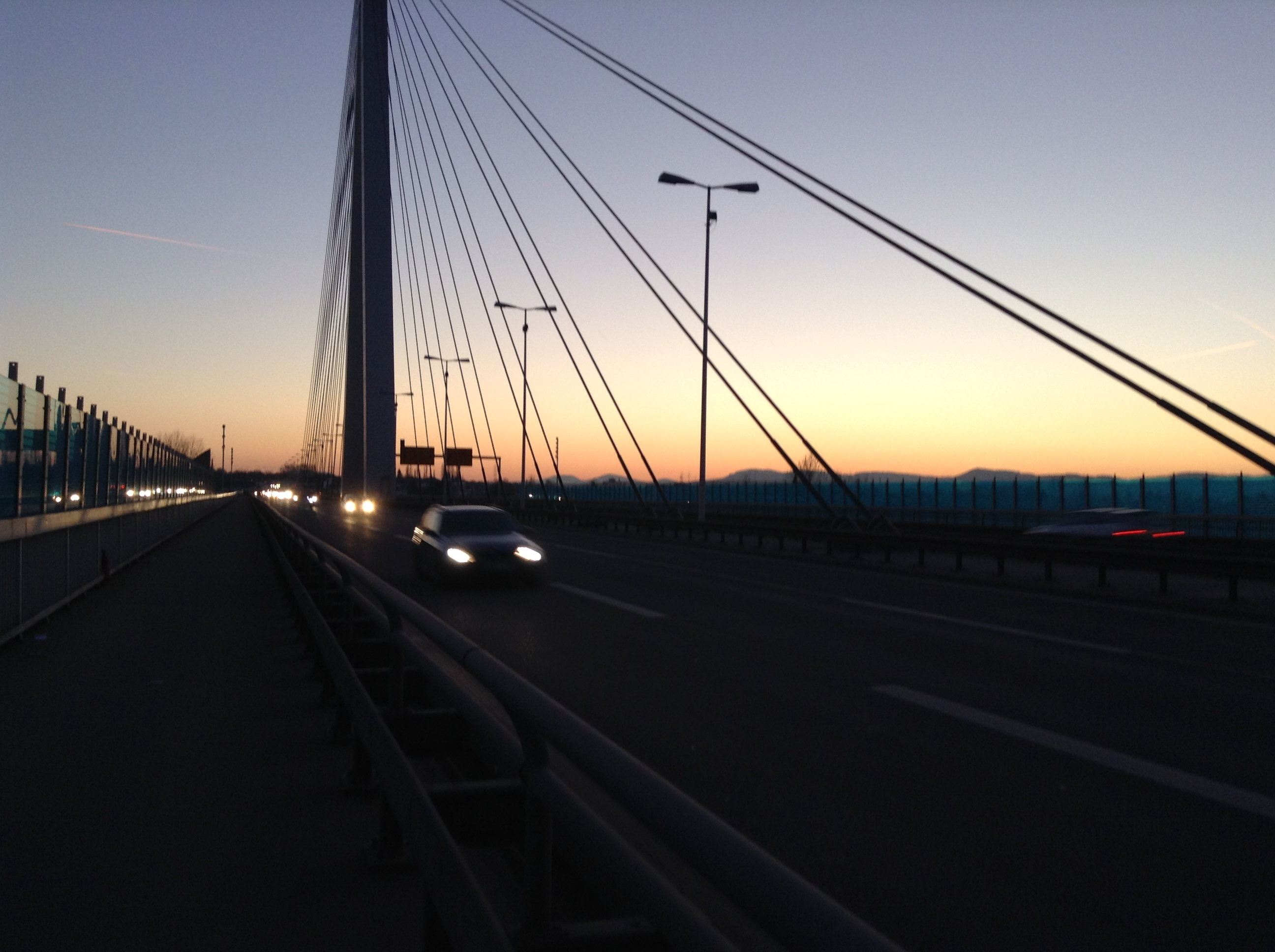 Die Raiffeisenbrücke Neuwied bei Nacht.